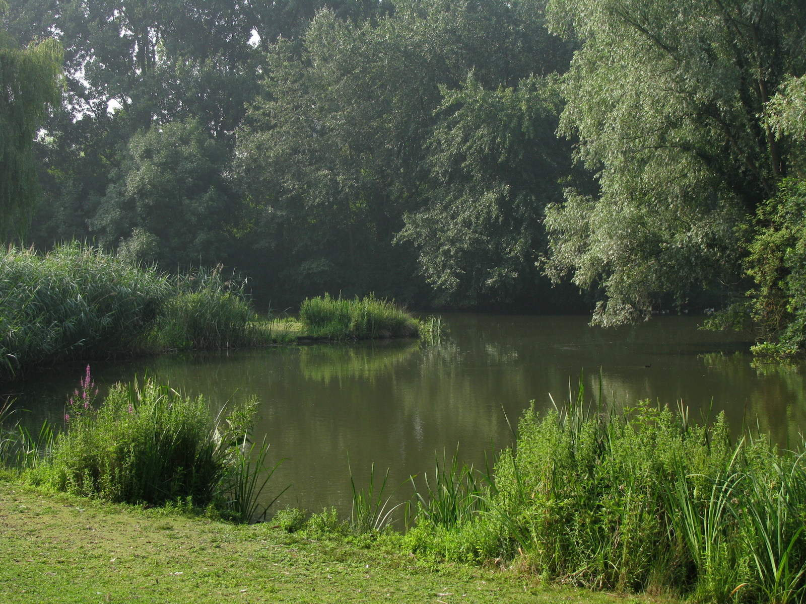 Liedermeerspark